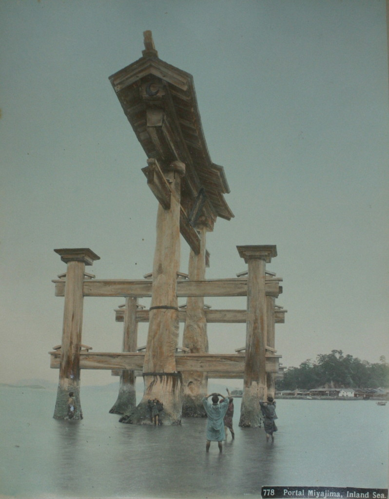 厳島神社鳥居。鹿島清兵衛撮影。1890年代。